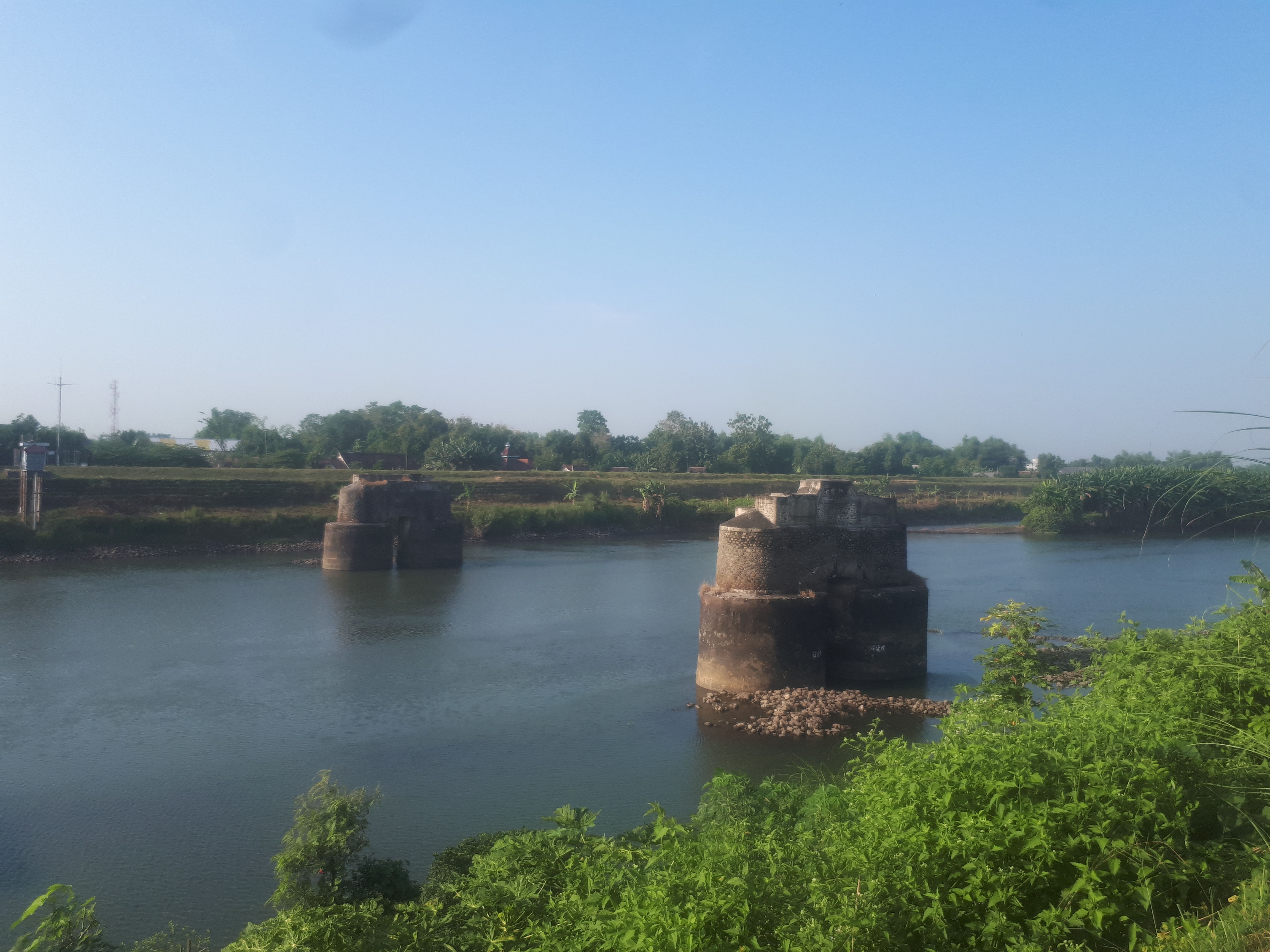 Tiang pancang pada bekas jembatan kereta api lintas Jombang-Babat di atas Sungai Brantas, 2020